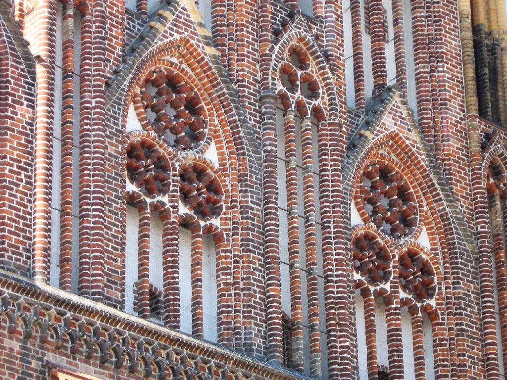 Die Marienkirche in Neubrandenburg - Maßwerk Giebel.